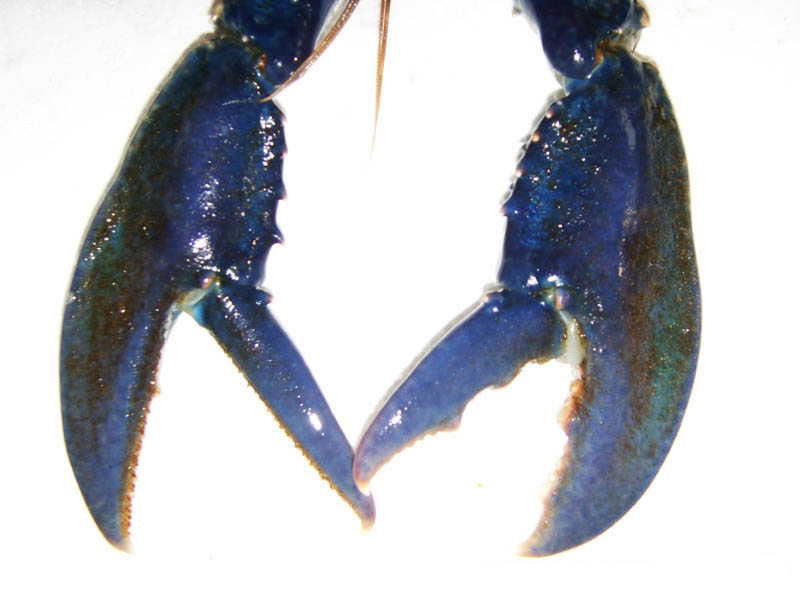 Différence entre les deux pinces du Homard (homarus gammarus)